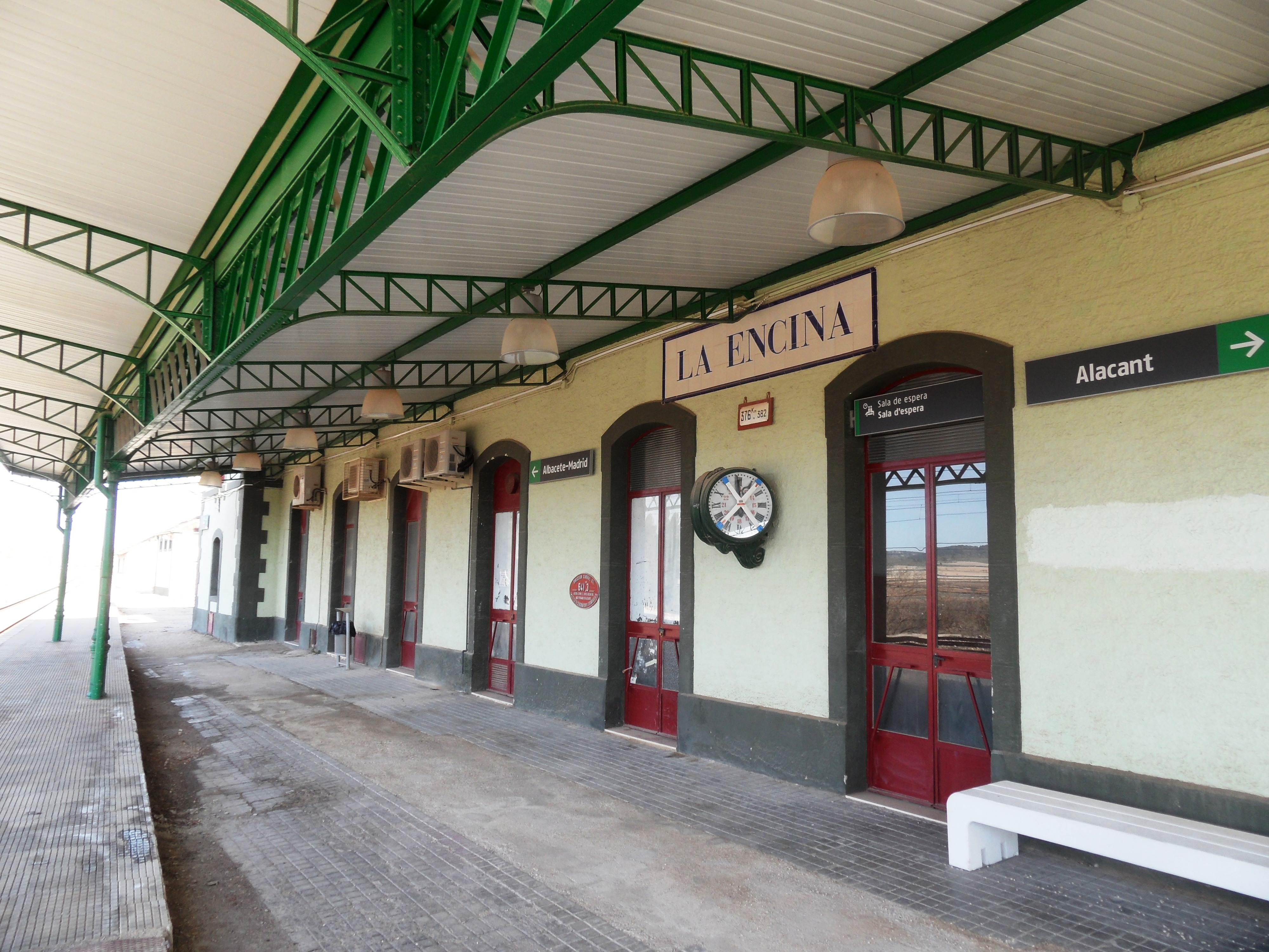 Edificio de la estación de la Encina, marquesina oeste.